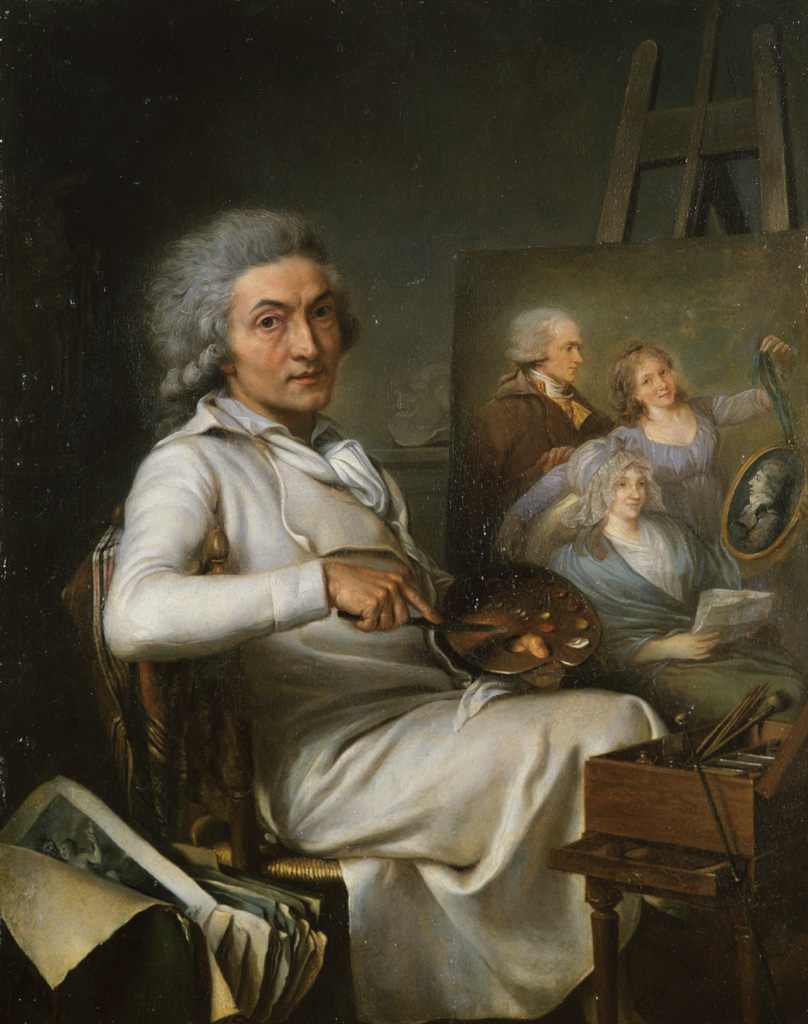 L'Artiste peignant un portrait de famille